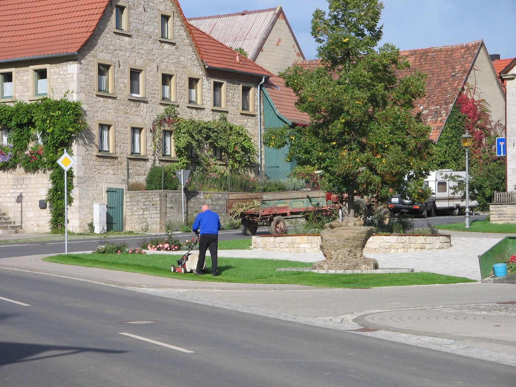 Dorfplatz von Sonderhofen (Bayern)